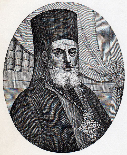 Gerasim Zelić (1752-1828), archimandrite. Source: newspaper xylograph, around 1880. Serbian: Герасим Зелић (1752-1828), архимандрит. Извор: новинска ксилографија око 1880.